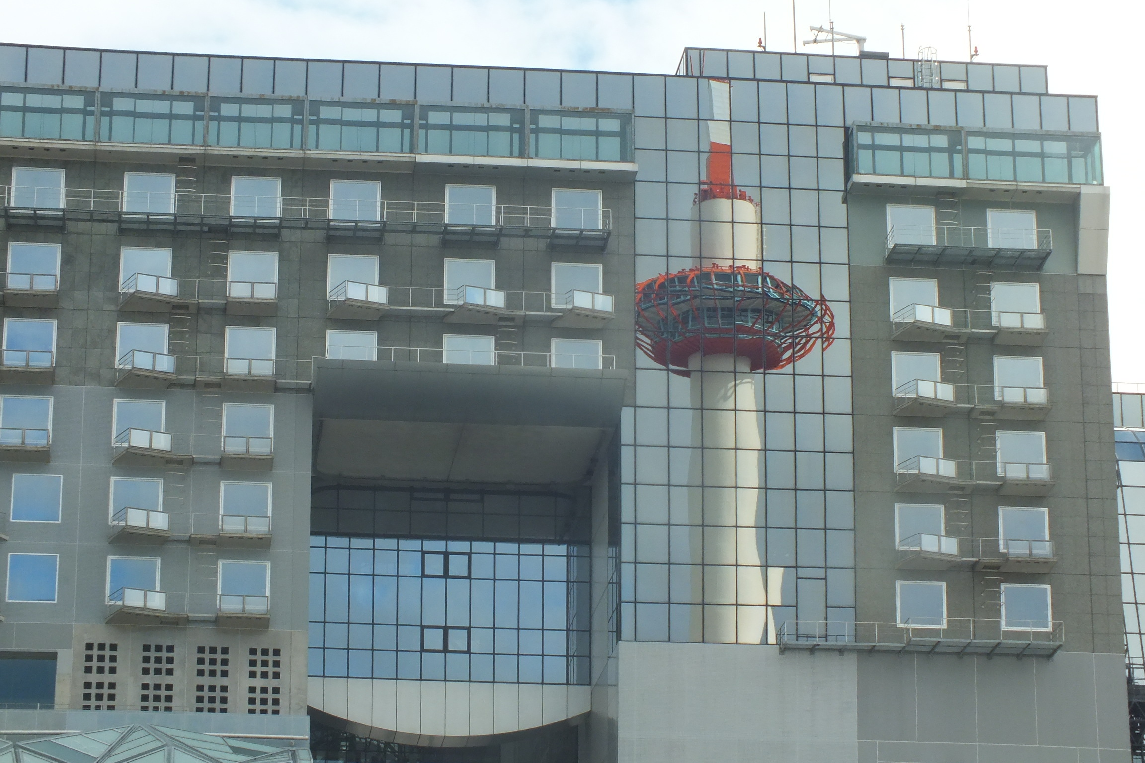 2016-09-08 Kyoto Station building (1997)、京都駅ビル